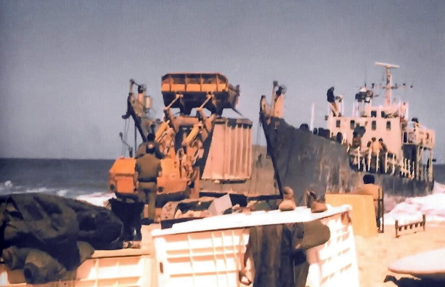 נחתת מעבירה טרקטור לבסיס דפנה בחוף הים